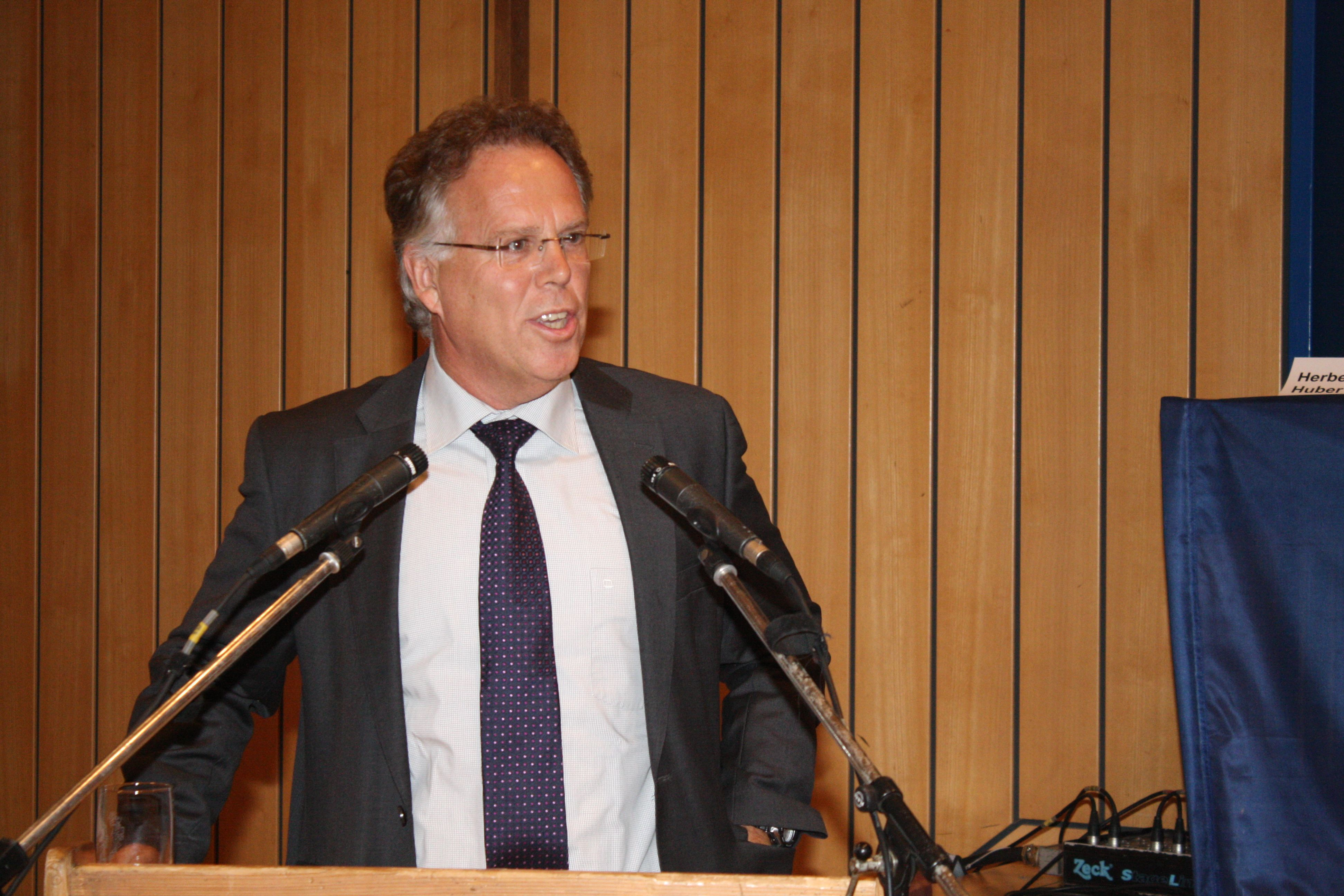 Berufsschullehrerverband Baden-Württemberg Reinhard Frank auf einer BLV-Podiumsdiskussion zur Zukunft der Beruflichen Bildung in Tauberbischofsheim 2012